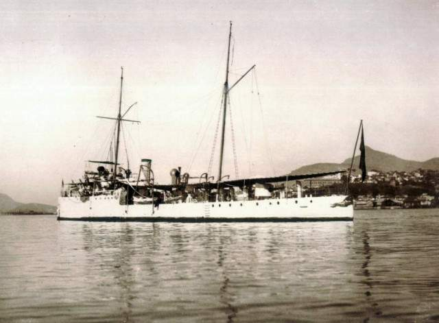 Navio "Caça-Torpedeiro Gustavo Sampaio" na Baia da Guanabara (Marinha do Brasil) - Naval ship of Brazil.